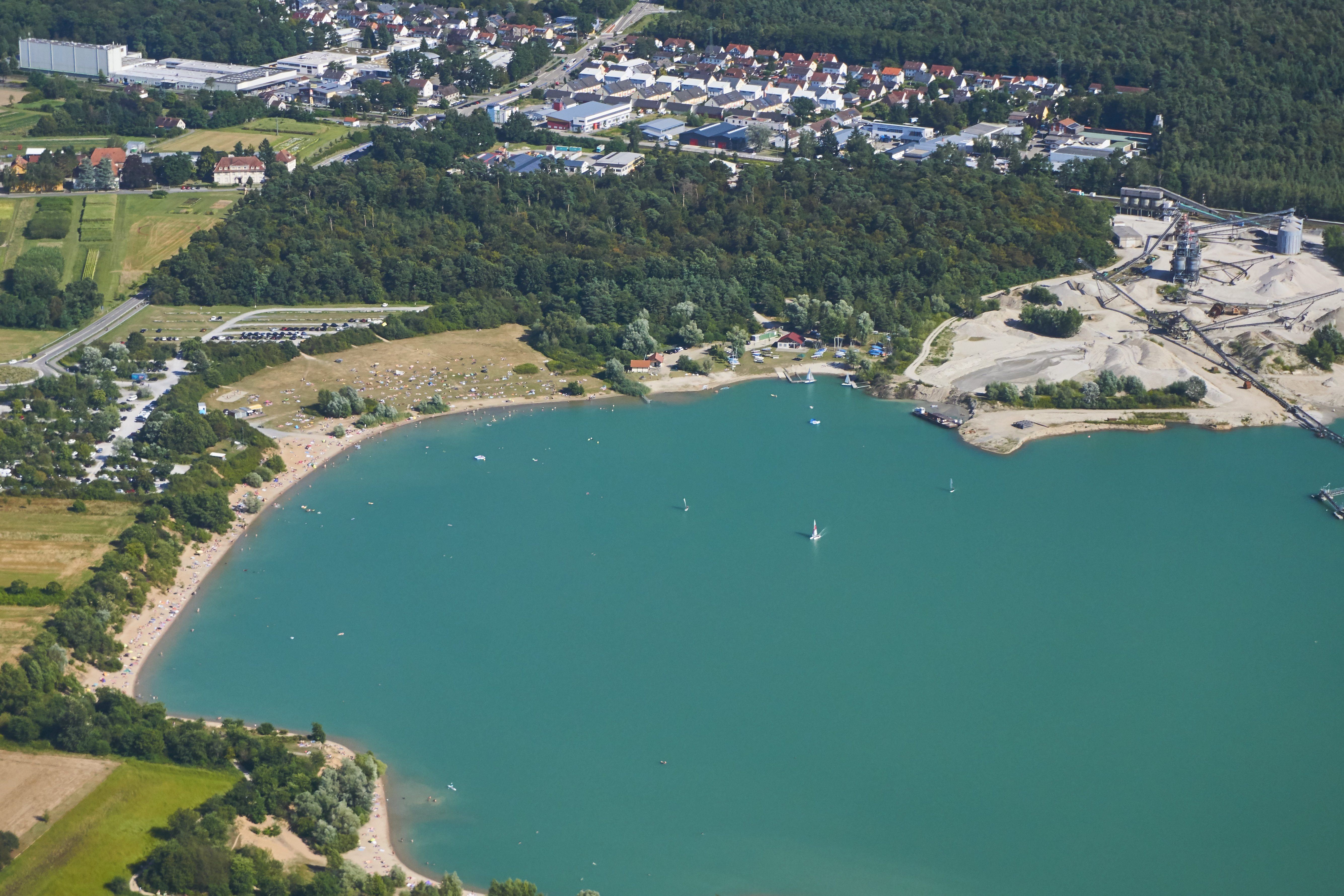 Luftaufnahme des Epplesees bei Karlsruhe, dahinter der Forchheimer Ortsteil Silberstreifen